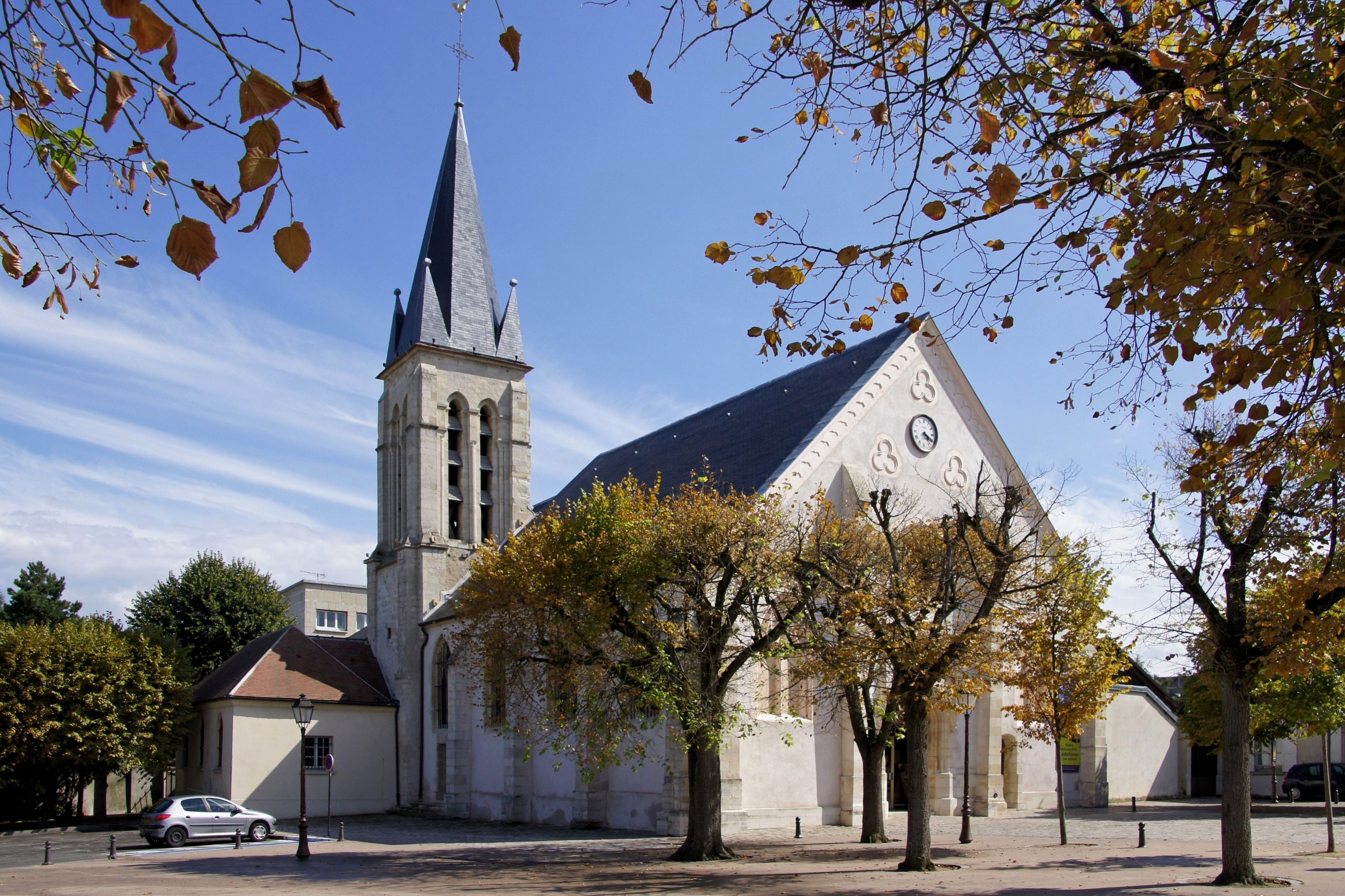 L'église d'Antony (92)